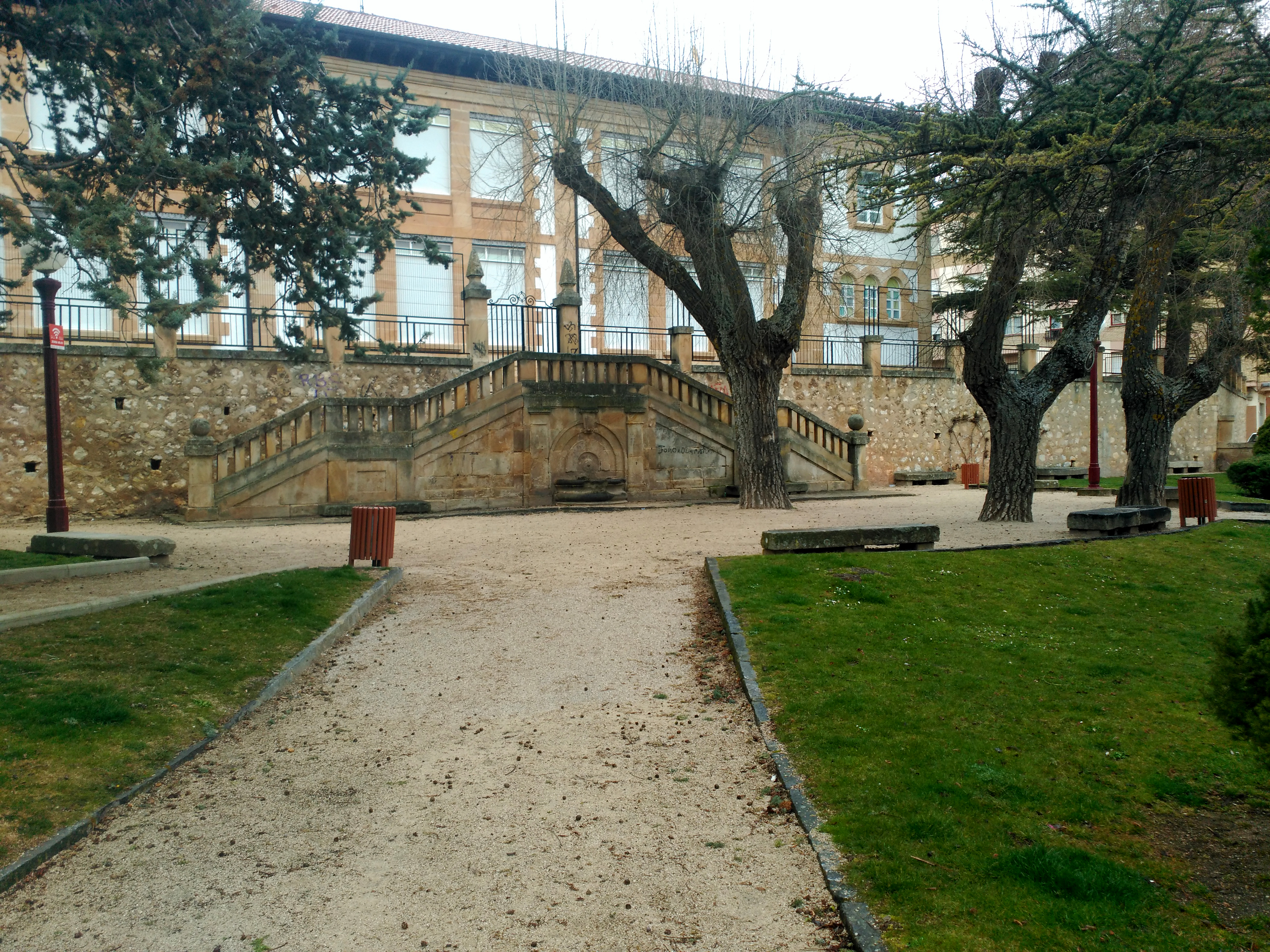 Parque de la Arboleda de Soria.